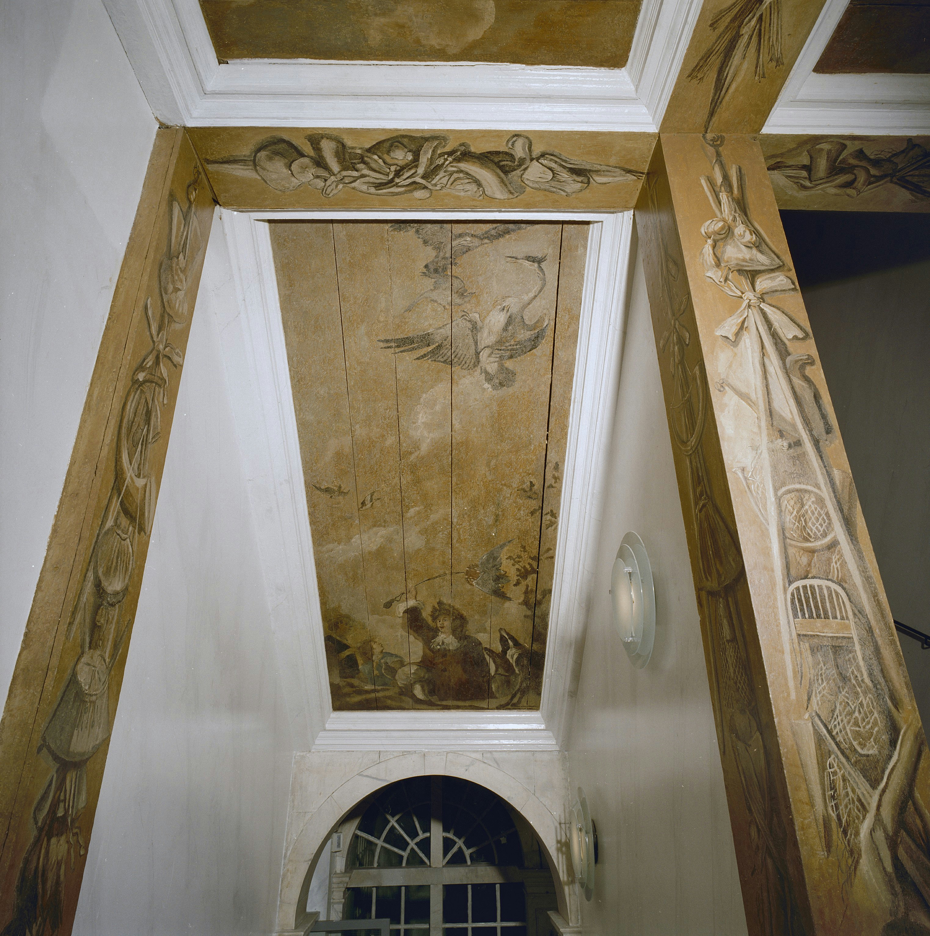 Trippenhuis: INTERIEUR, TRAPPENHUIS, SPIEGEL, PLAFONDSCHILDERING